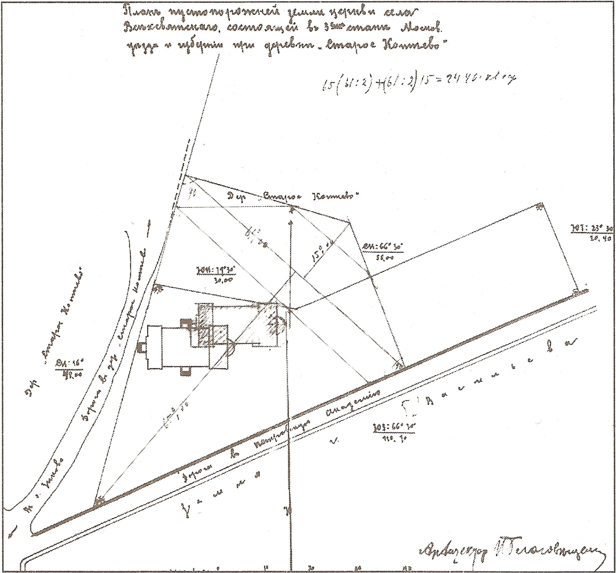 План расположения храма Святителя Николая в Коптеве.